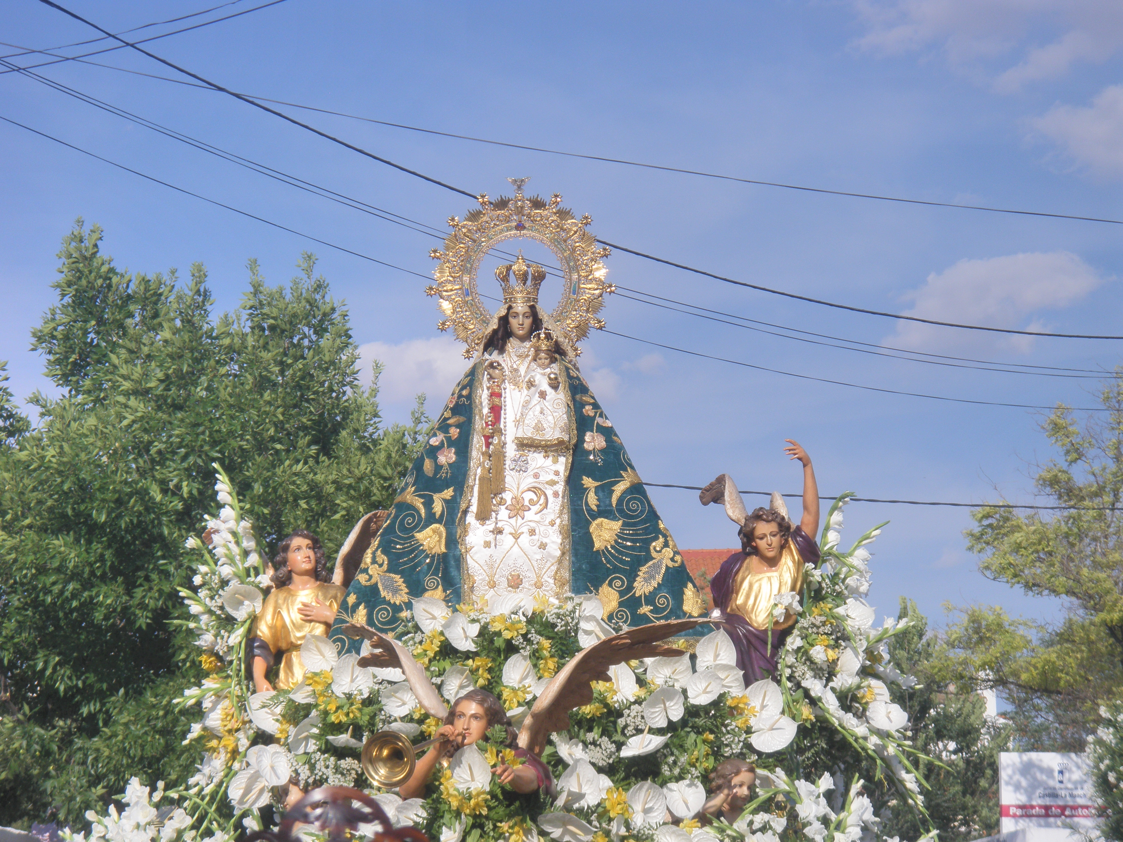 Virgen de Riánsares - Patrona de Tarancón